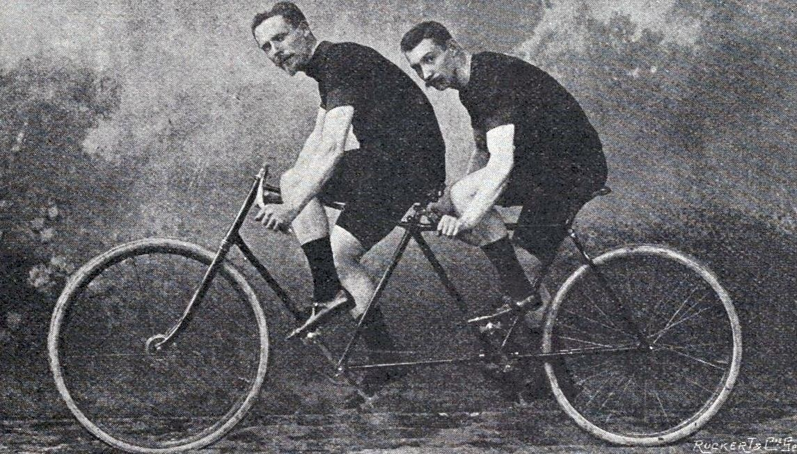 Henri Rudeaux et Lloyd Hildebrand, recordmens du monde des 50 miles, en septembre 1894.